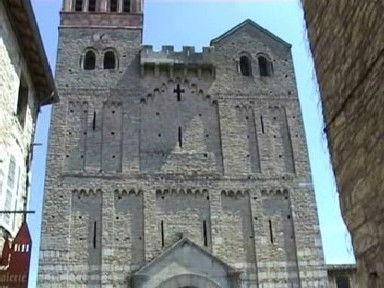 Lisenen und Bogenfriese an der Fassade von S.Philibert in Tournus in Burgund